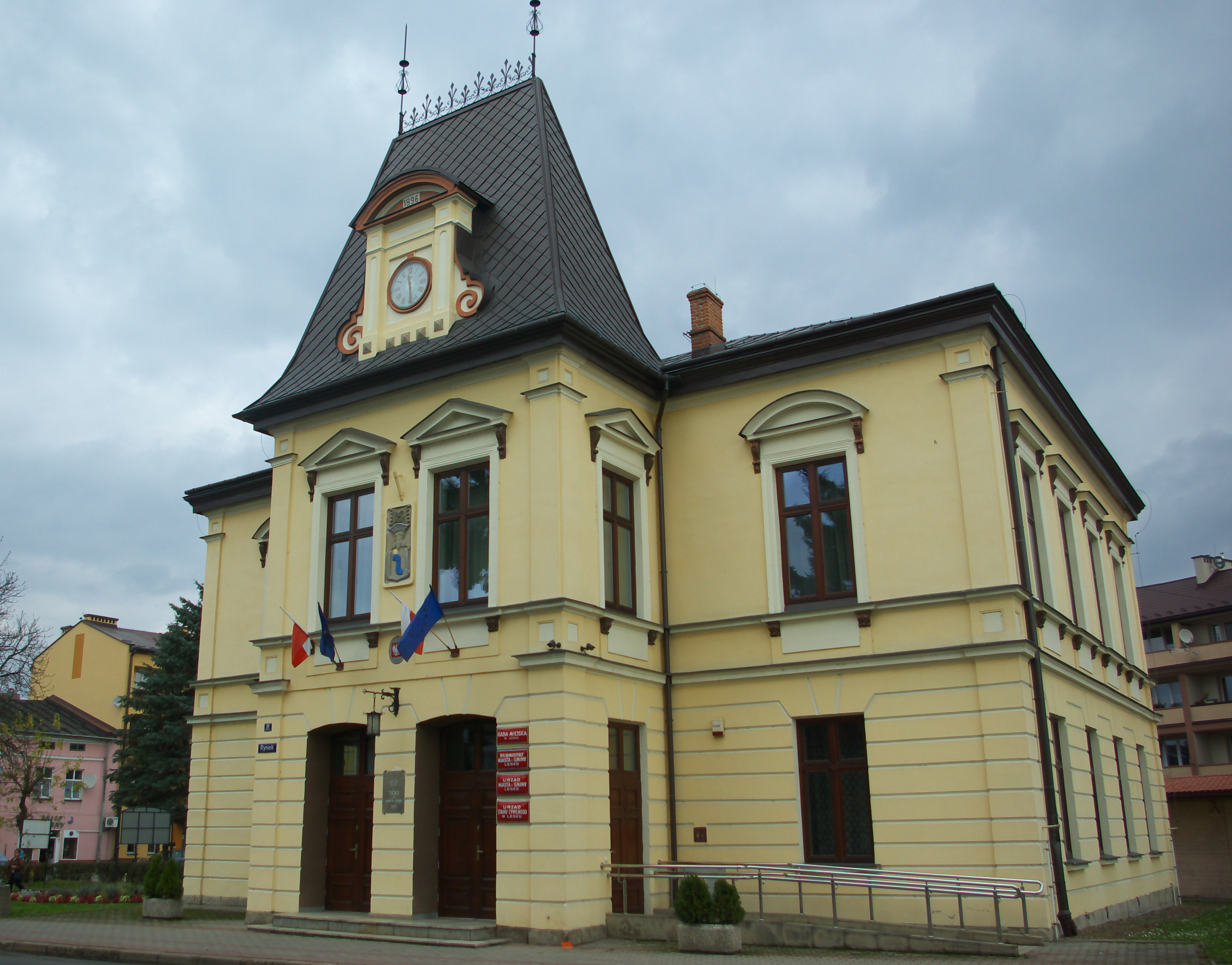 Ratusz w Lesku (2017).